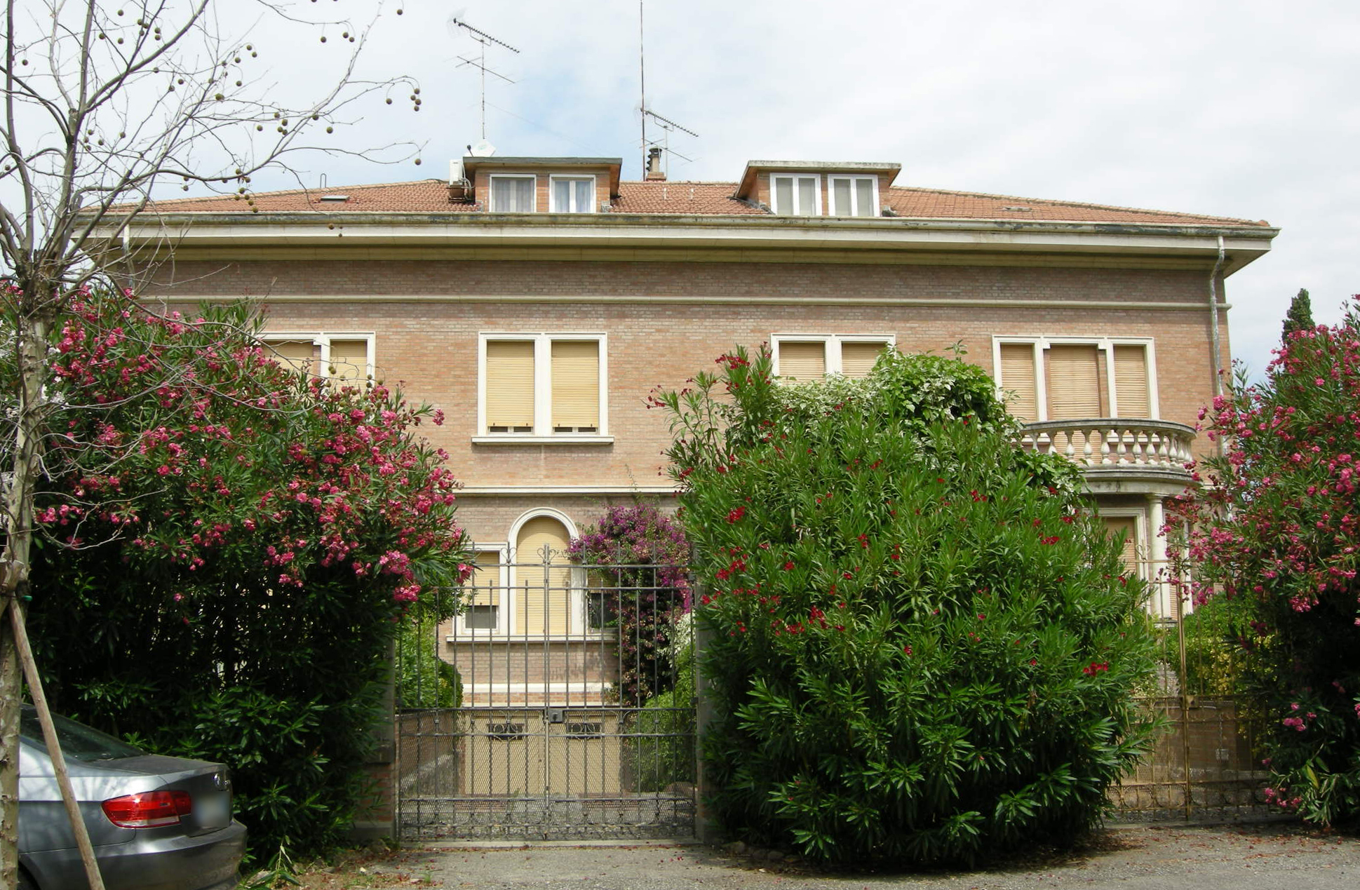 Villaggio solvay, casa per dirigenti